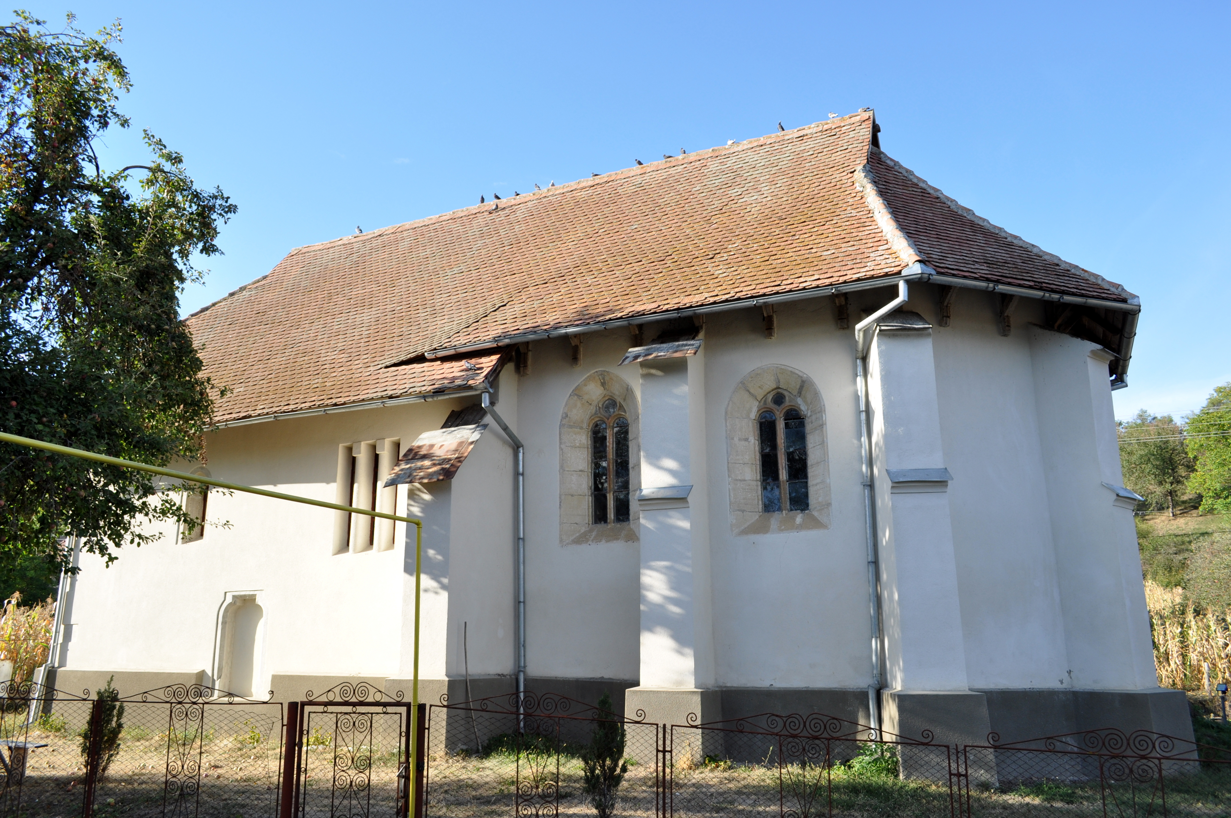 Biserica reformată, sat VIŢA; comuna NUŞENI 01